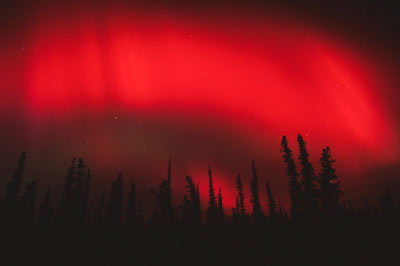 aurora